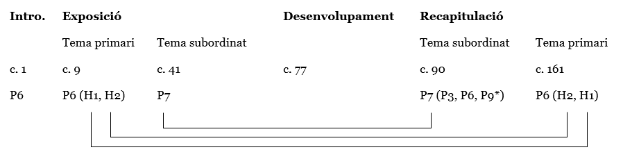 Reconceptualització de la forma sonata al Quartet de cordes 1 de Gerhard